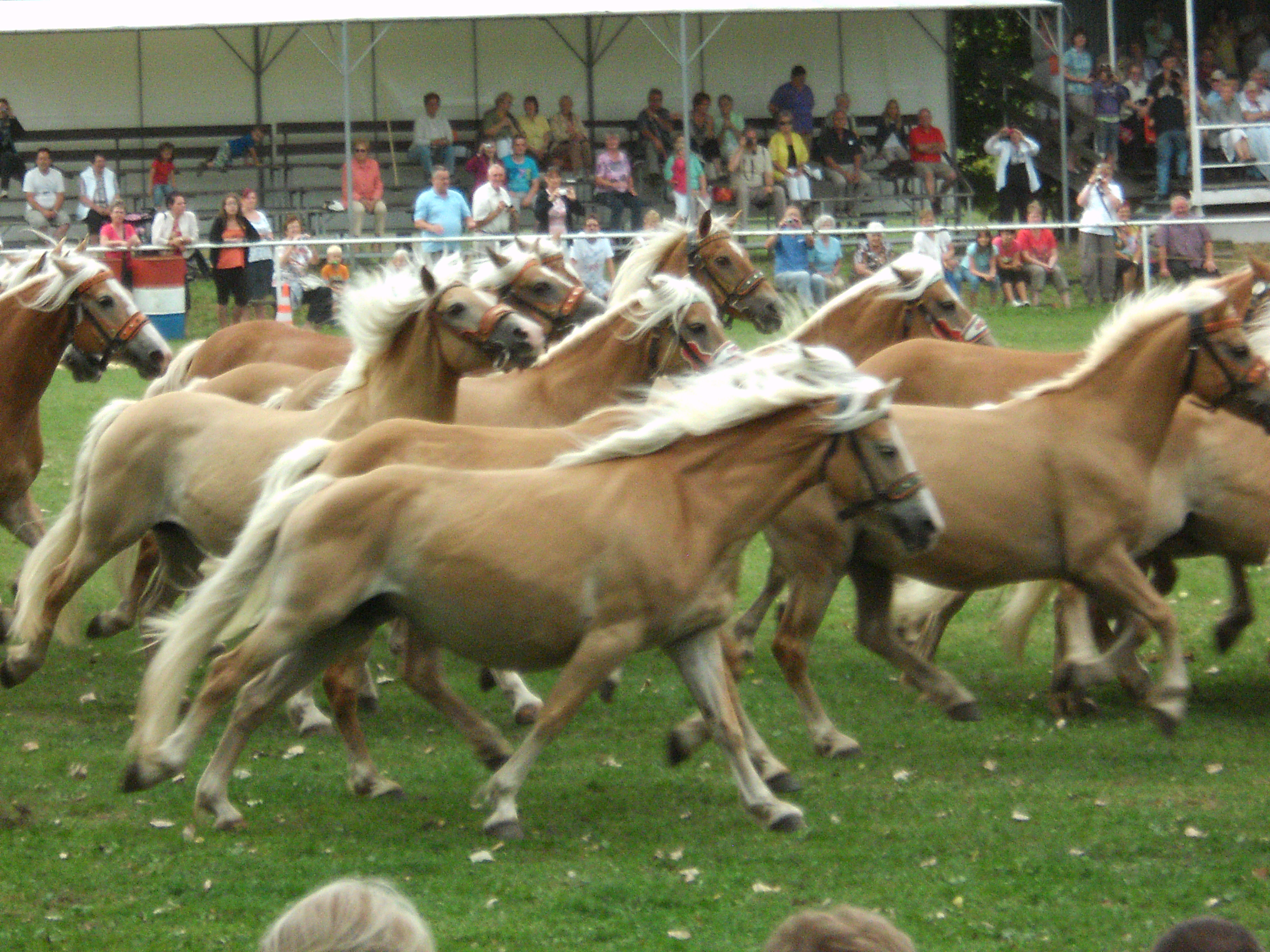 Edelbluthaflinger und Haflinger im Haflingergestüt Meura